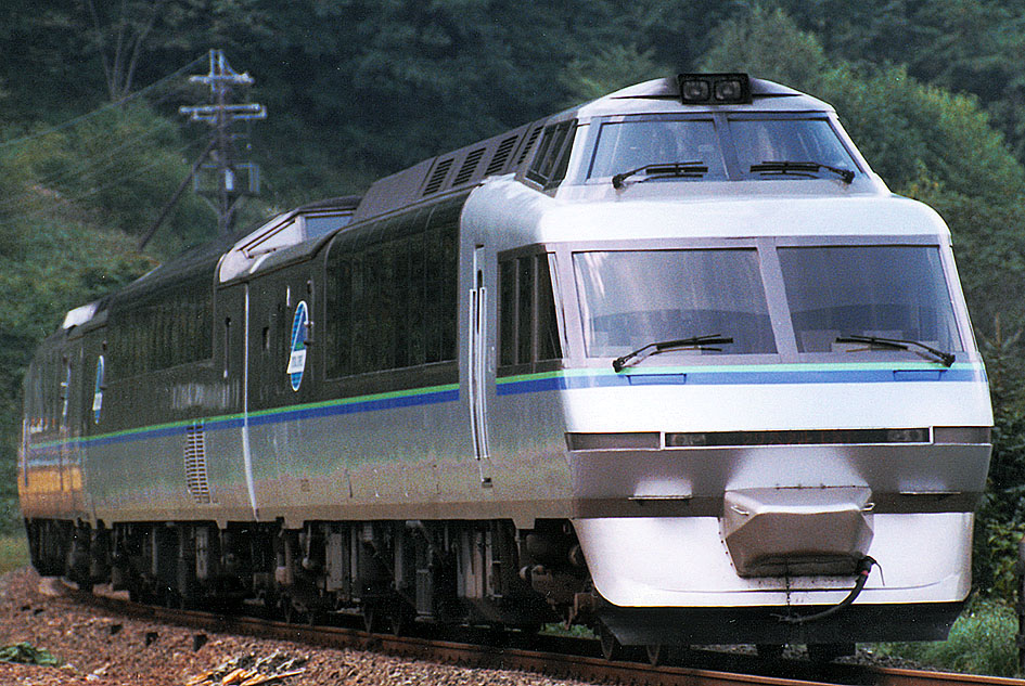 JR北海道 キハ183系クリスタルエクスプレストマム＆サホロ（3両）